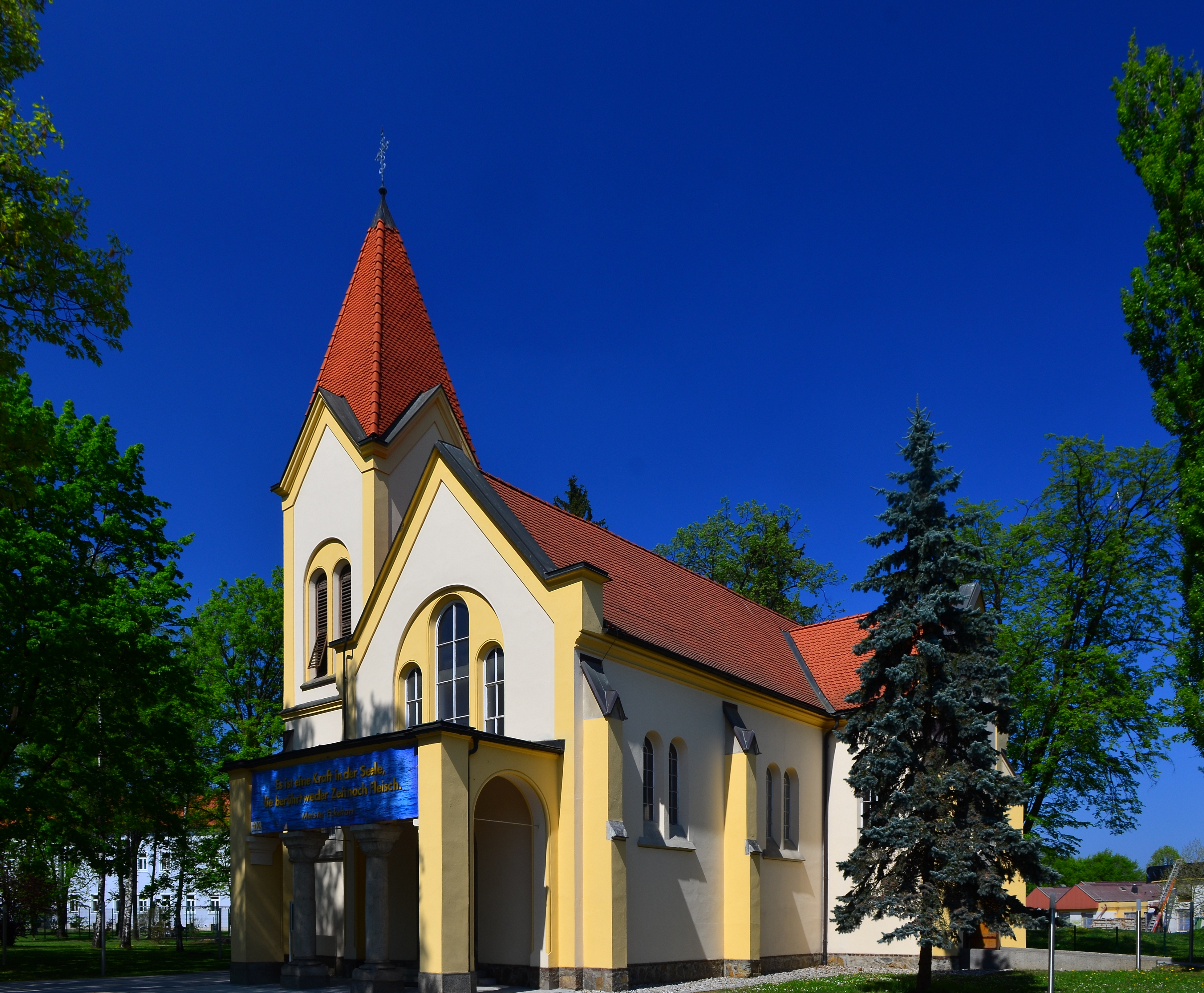 Anstaltskirche der Landesnervenklinik Sigmund Freud Church of LSF Graz